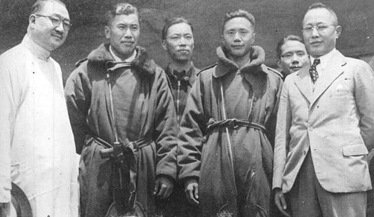 纸片轰炸参与者受到孔祥熙（左一）的欢迎